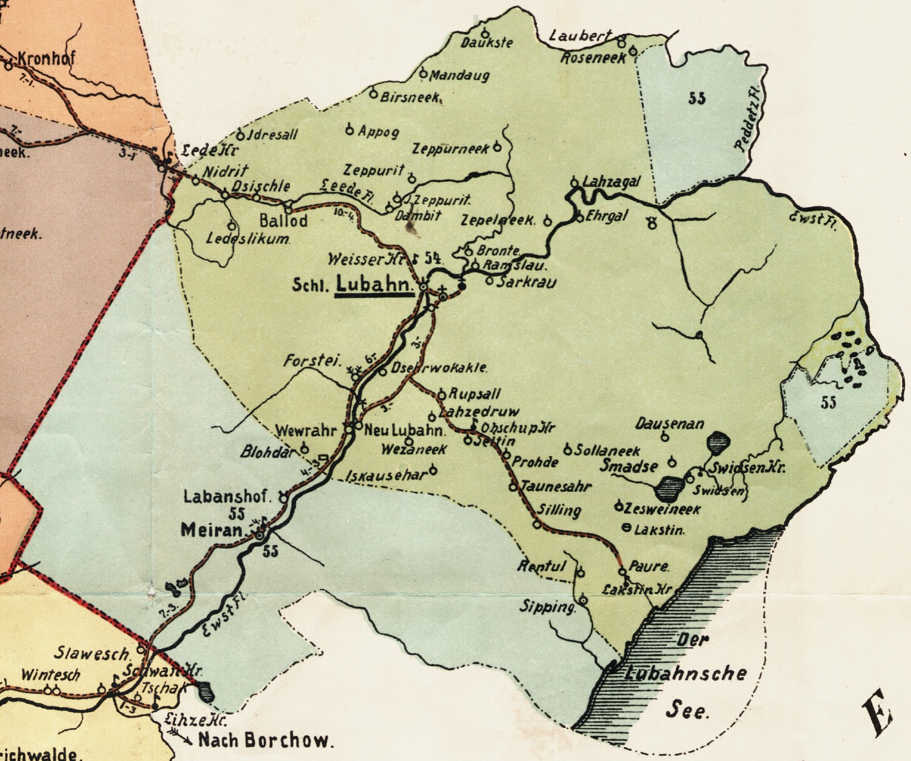 Lubāna kihelkonna mõisad 1903. aasta kaardil.